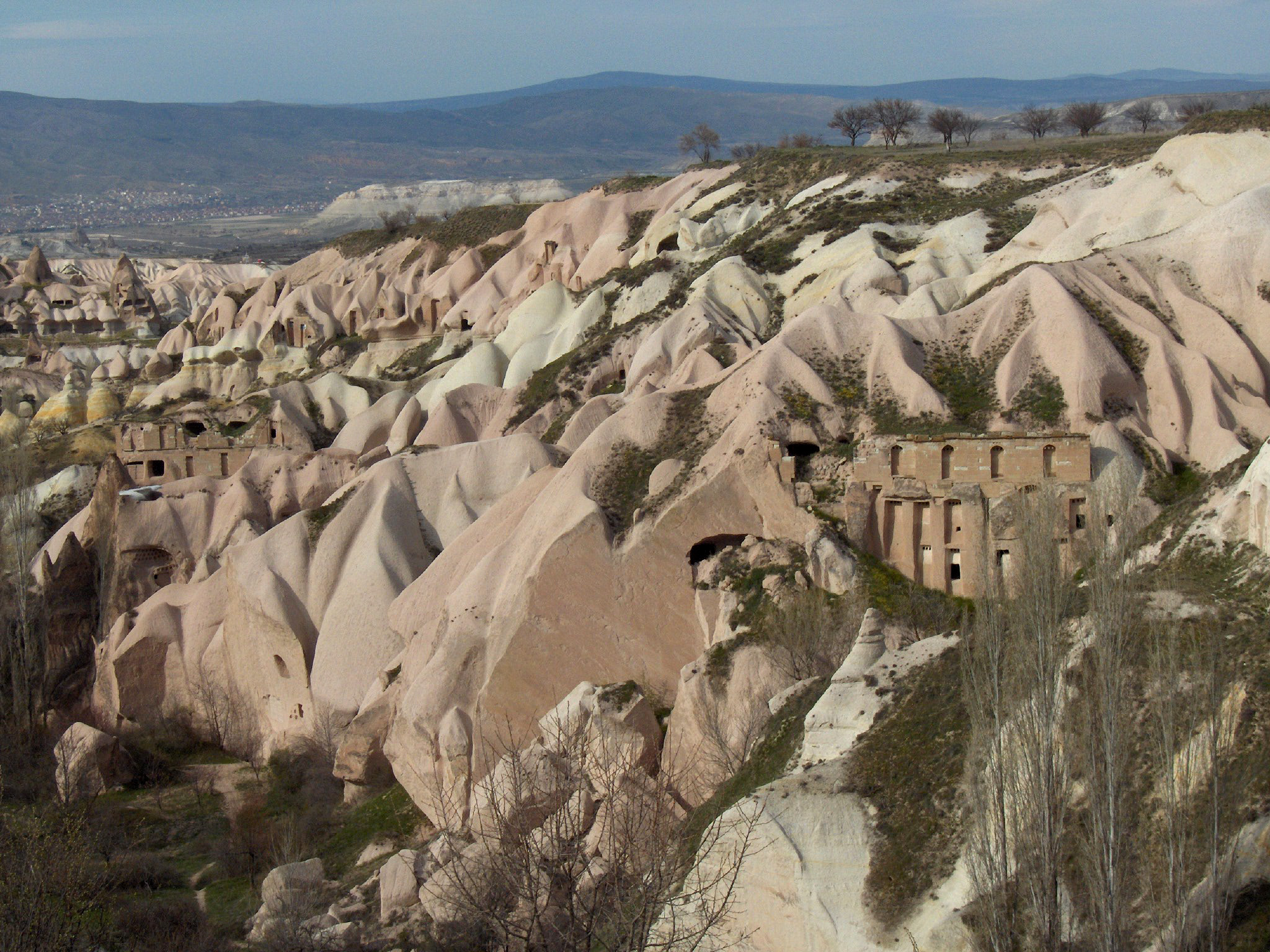 Duivenvallei, Uçhisar; Cappadocië, Turkeye